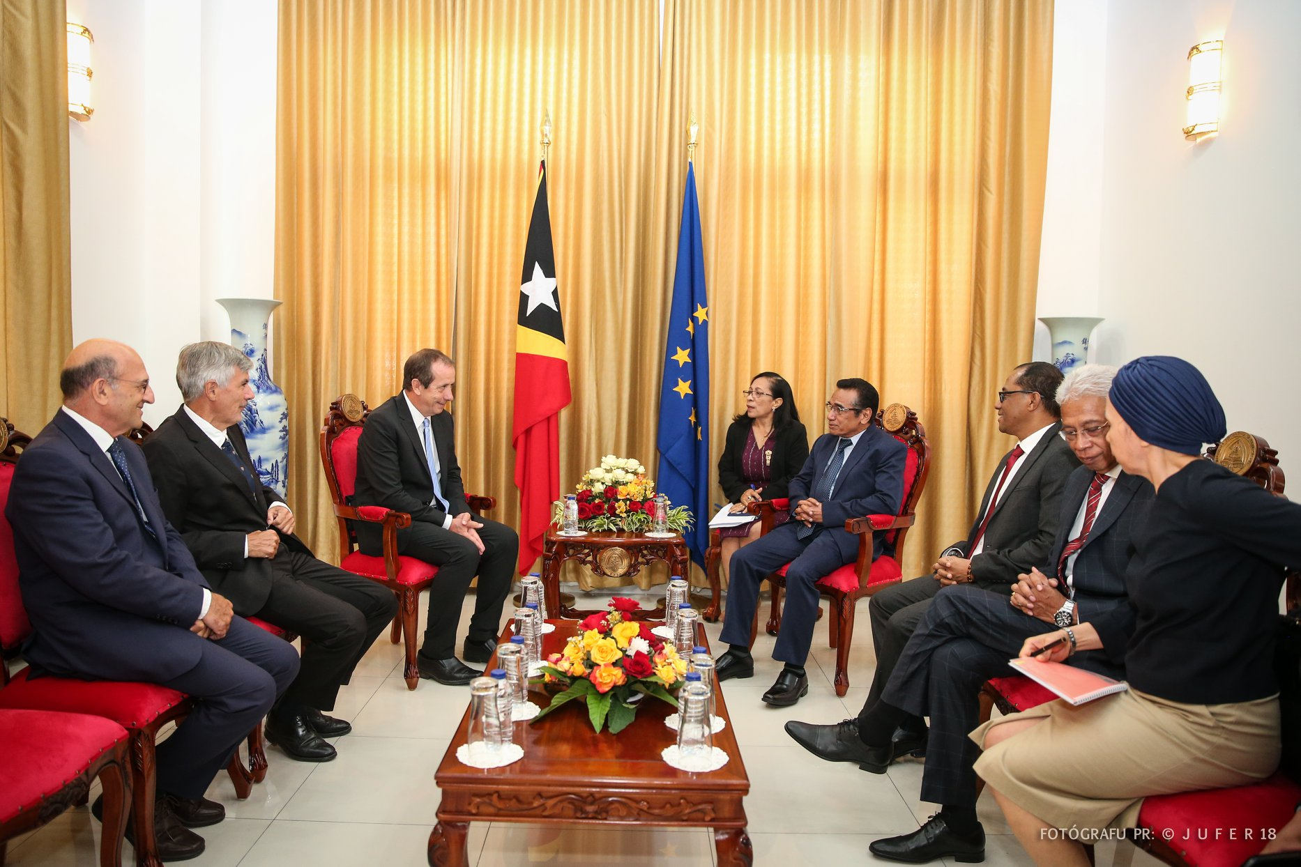 Andrew Jacobs übergibt seine Akkreditierung als Botschafter der Europäischen Union an Osttimors Staatspräsident Francisco Guterres.